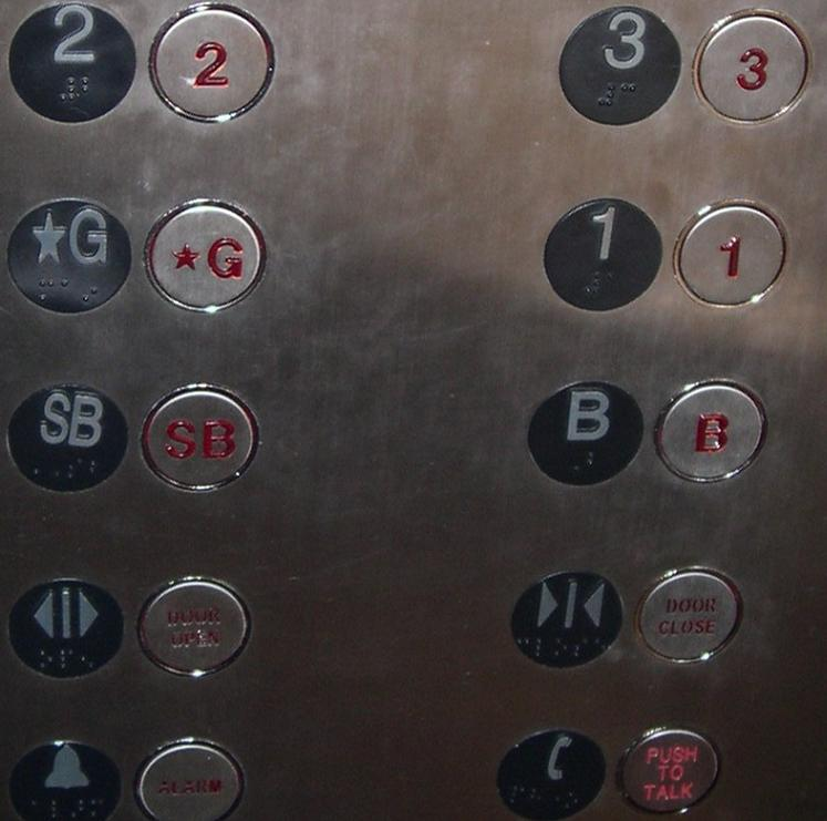 Accessible Elevator Buttons